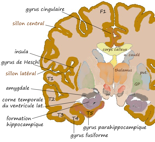 Coupe coronale au niveau de l'amygdale